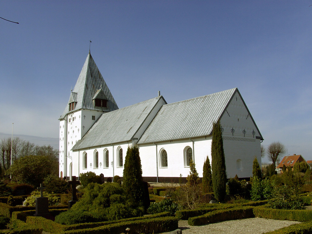 fra sydøst